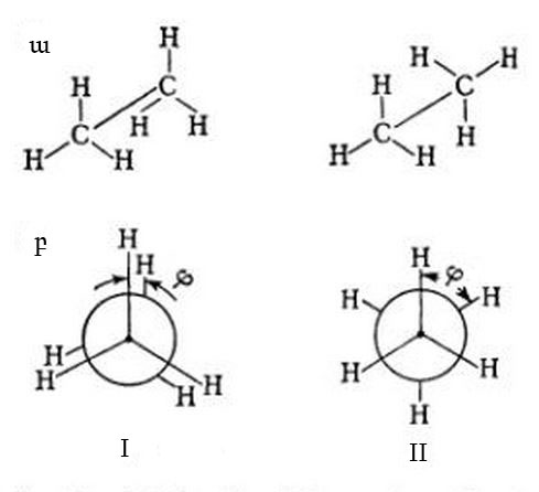 Նկ. 1. Էթանի կոնֆորմացիաները. ա. հեռապատկեր բանաձևեր, բ. Նյումենի պրոյեկցիոն բանաձևեր, I-դիմակայված կամ զույգ, II-արգելակված կամ կենտ, φ- տեղակալիչներով կազմված անկյուն